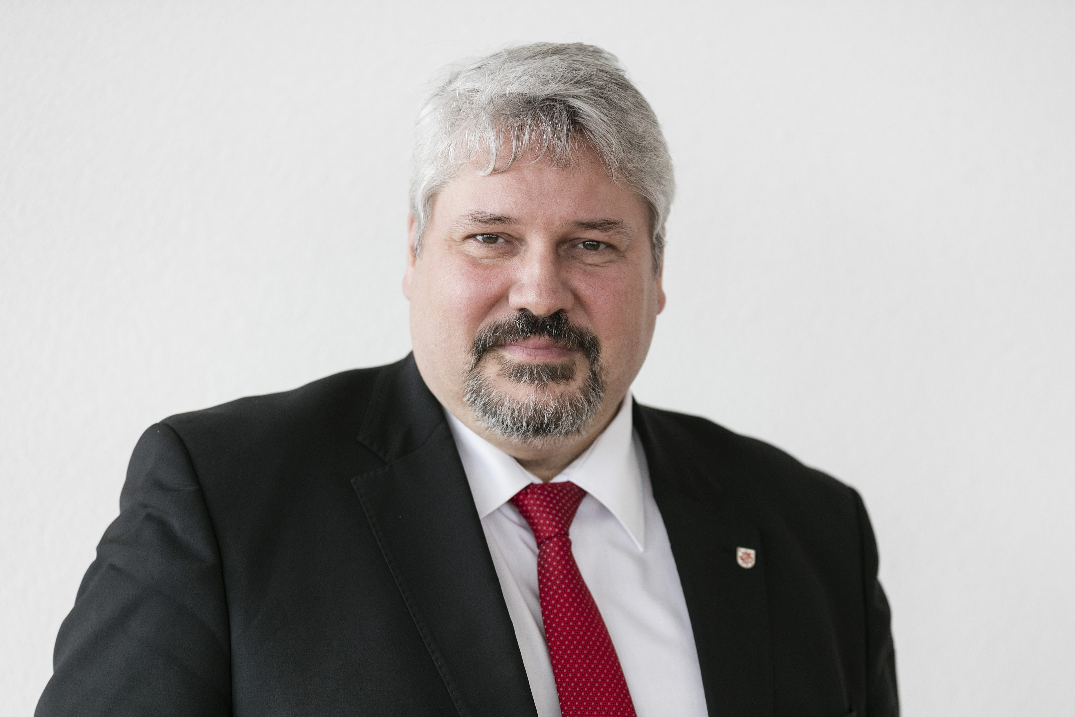 Winterthur , 03.03.2016 / Stadtpräsident Michael KünzleBild: Johanna Bossart